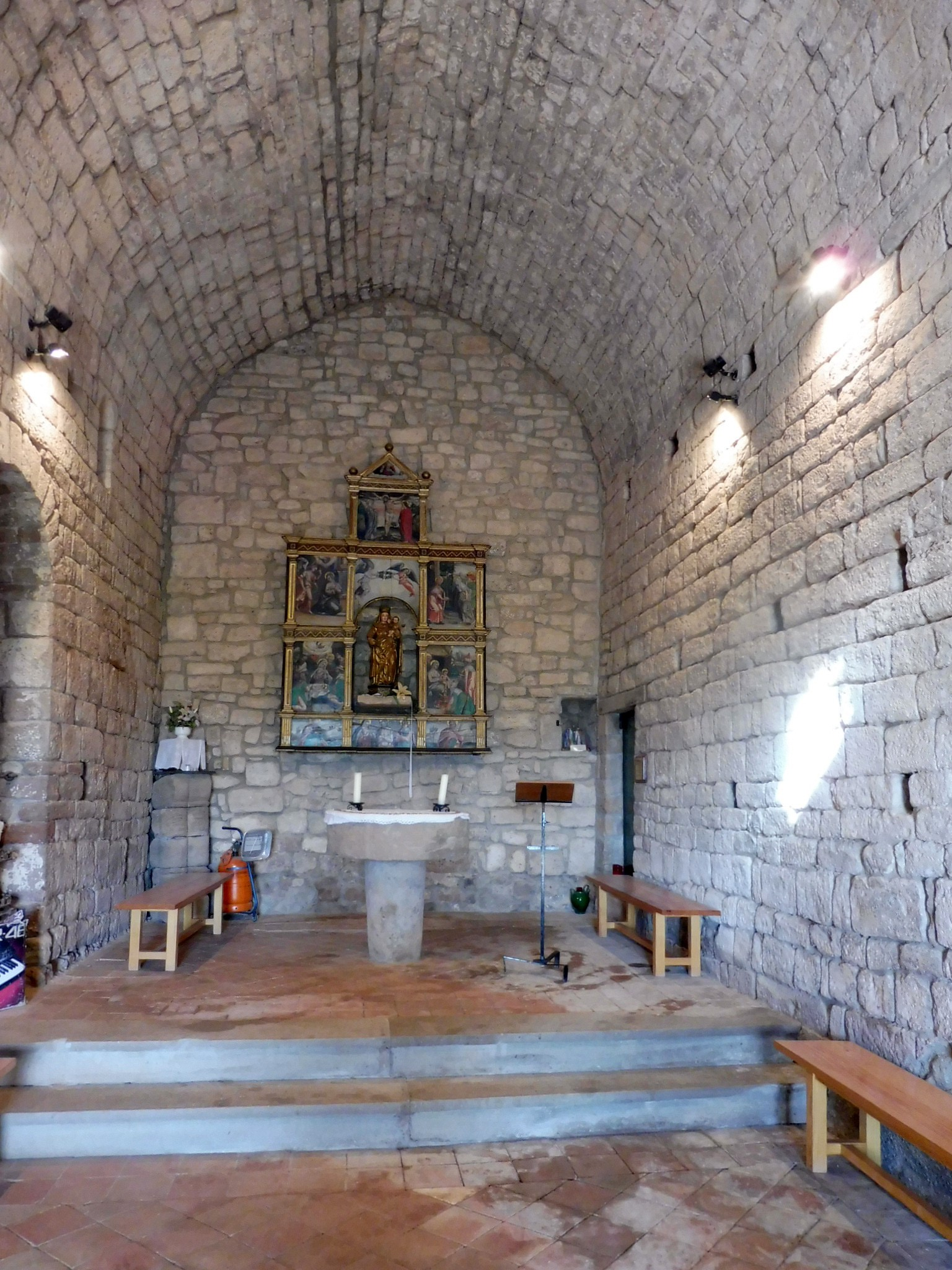 Capella de Santa Maria del Grau (Fonollosa): interior